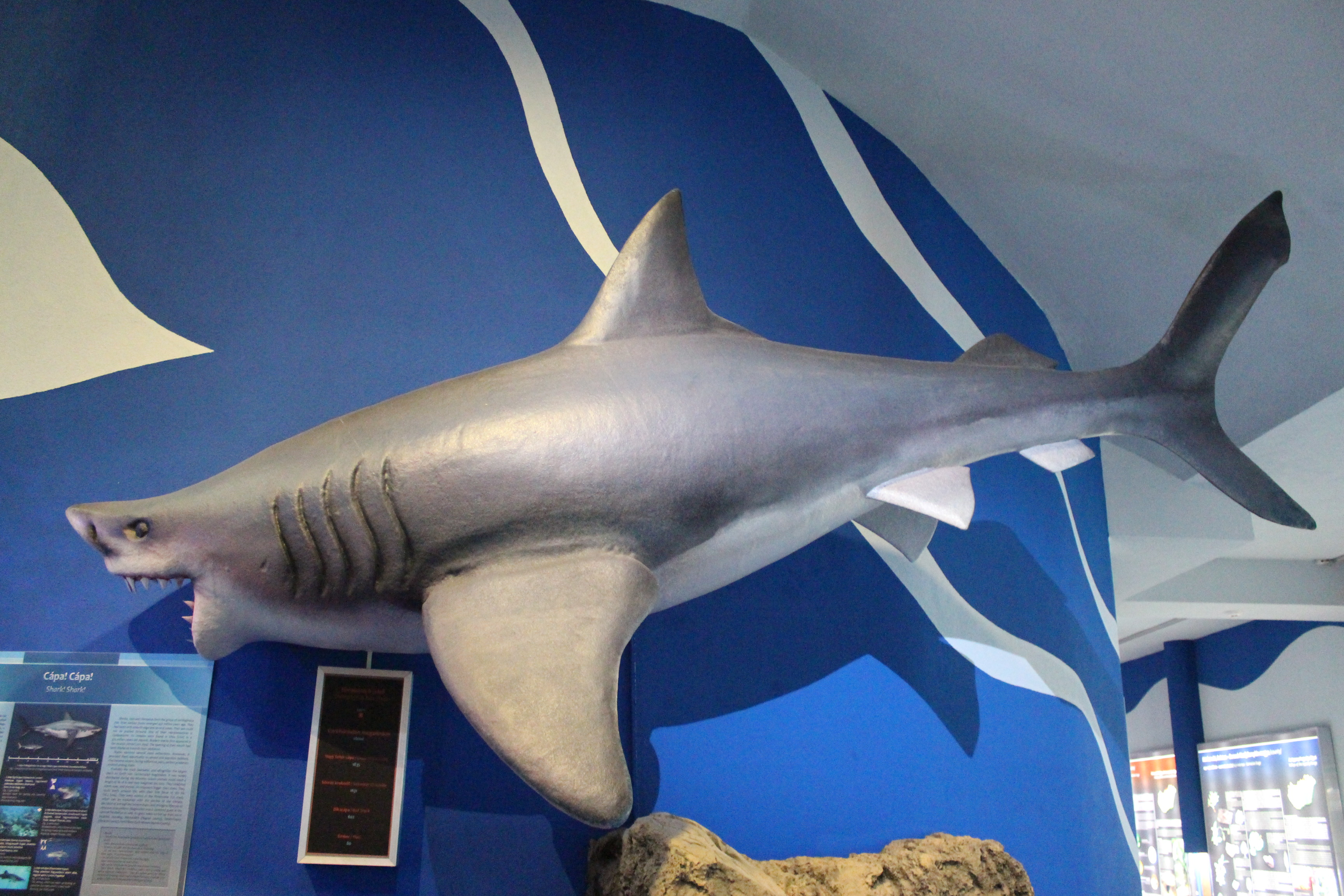 A Pannon-tó élővilága, Pannon-tenger Múzeum - Miskolc, Görgey Artúr u. 28.